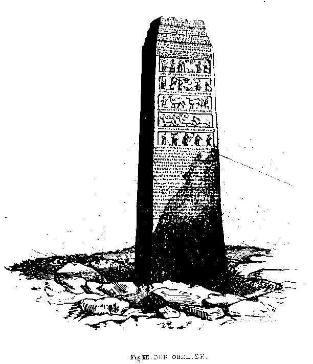 Der schwarze Obelisk - ausgegraben von Layard 1847 in Nimrud